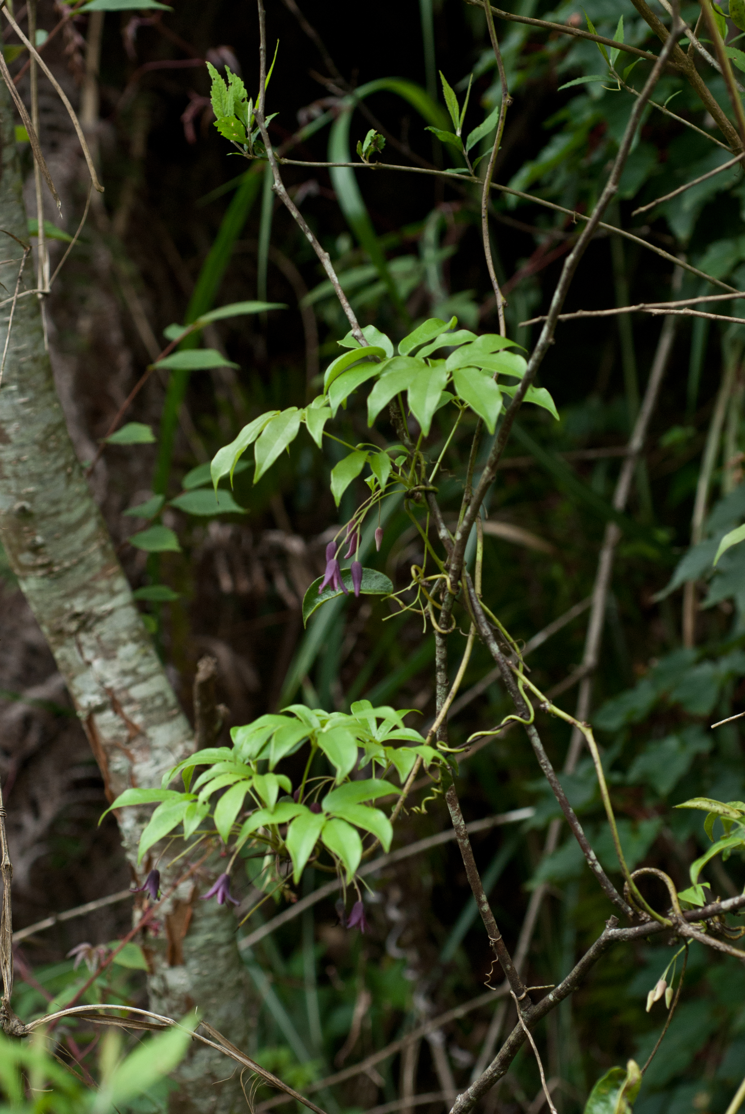 Lardizabalaceae, Stauntonia, Stauntonia purpurea Y. C. Liu & F. Y. Lu, 木通科, 紫花野木瓜, 野木瓜屬